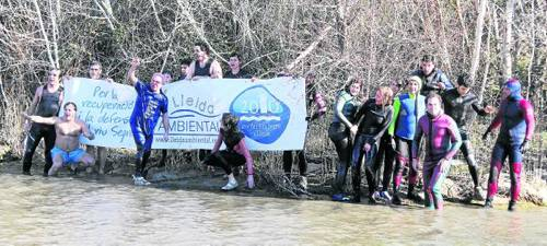 Capbussada Popular al Riu Segre